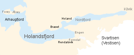 Kjelde konturar og namngjeving: Friluftskart for Salten, Salten friluftsråd, 1998